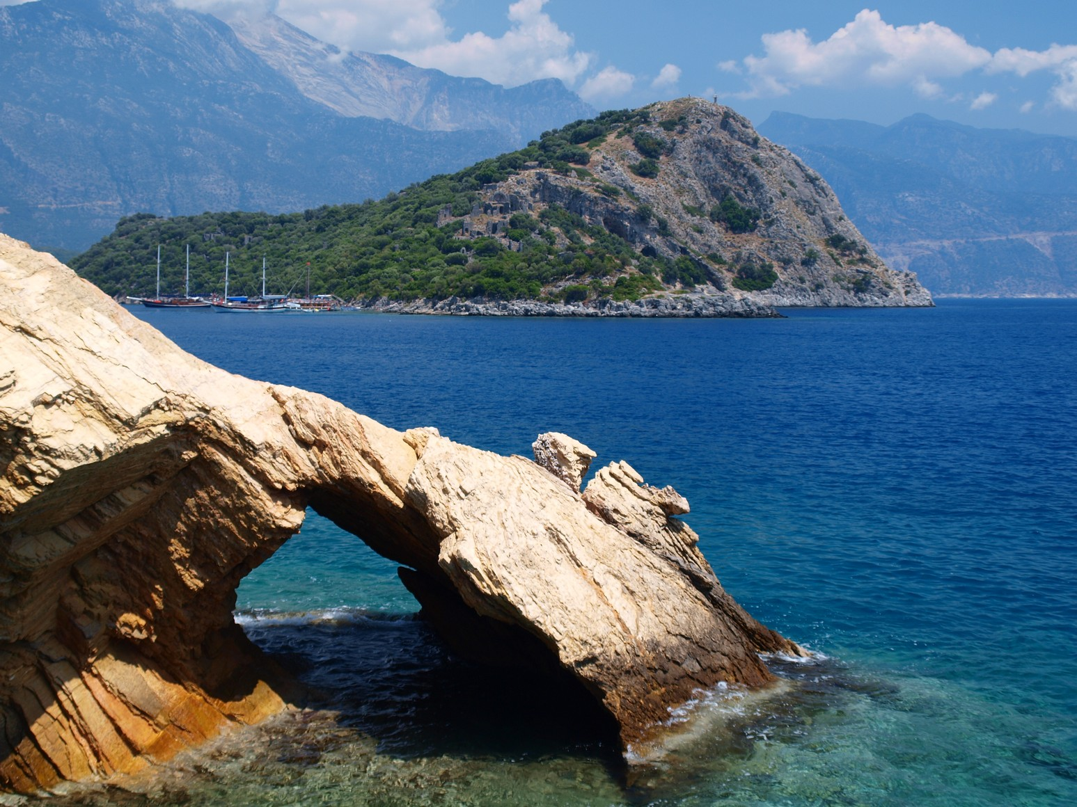 gemiler